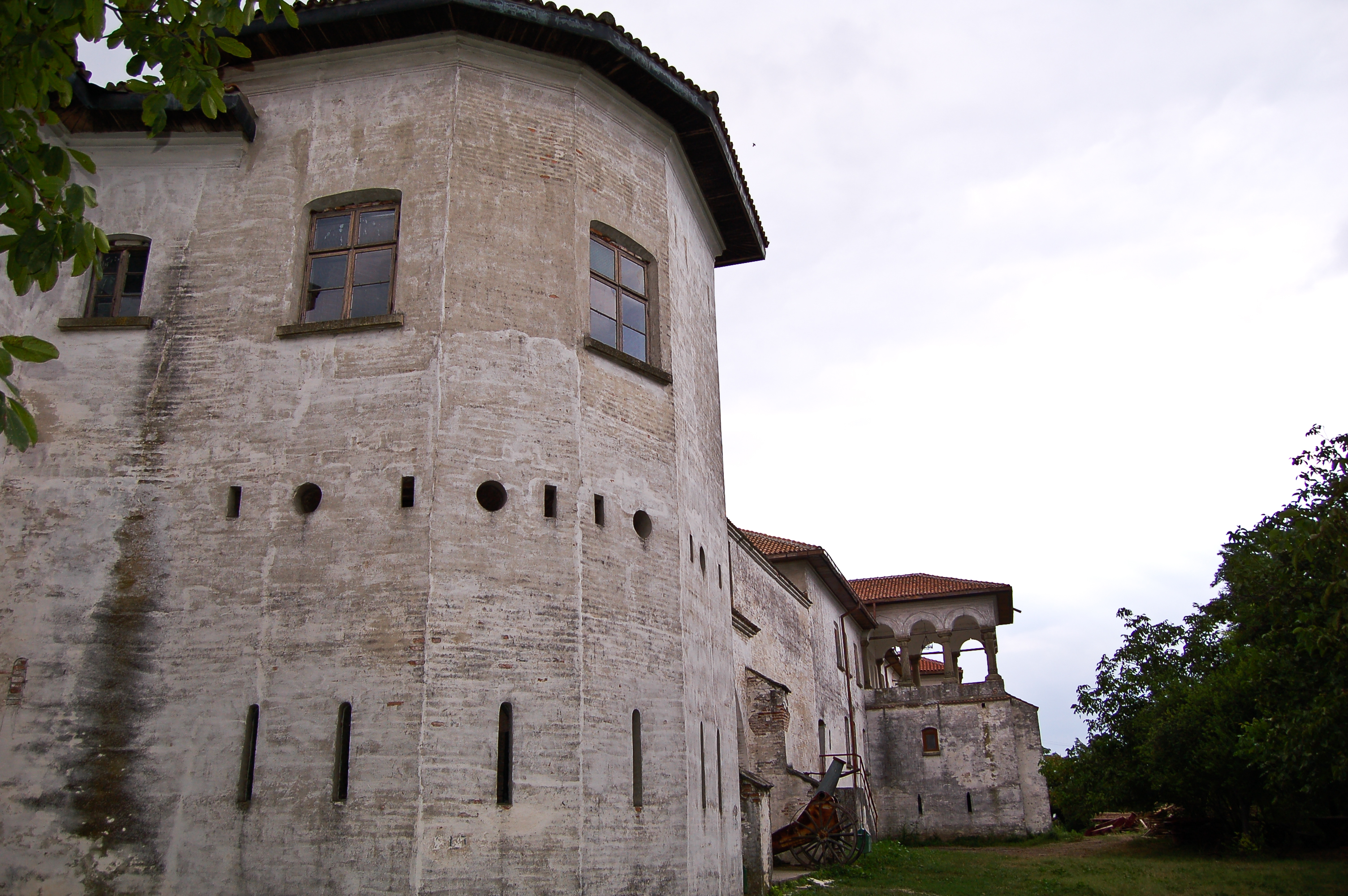 turn de aparate din fortificatia manastirii comana